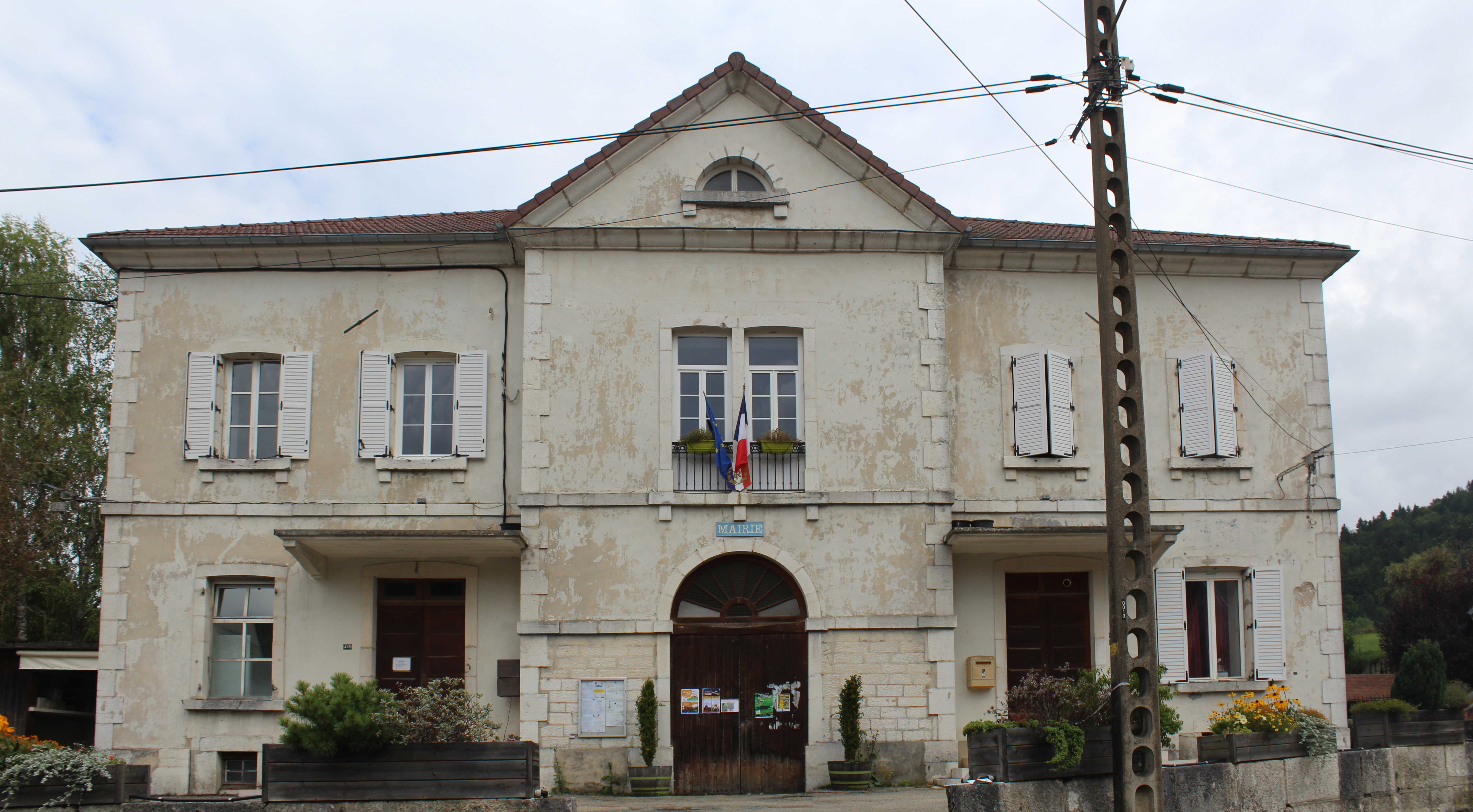 Mairie de Lalleyriat, Le Poizat-Lalleyriat.